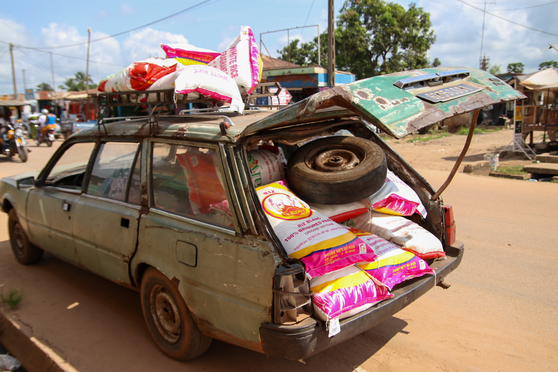 Cette photo a été prise lors d'un séjour humanitaire dans le village de Tollakro. N'ayant pas pu trouver de véhicules de transport permettant de livrer des vivres depuis la ville de Tiassalé en Côte d'Ivoire, cette voiture Peugeot 504 nous a été d'une grande utilité. J'ignore exactement la date de fabrication de ce véhicule. Mais elle reste l'une des voitures de transport les plus utilisées par les populations vivant dans les villages, notamment pour sa robustesse. Selon les besoins des usagers, elle sert également aux transports de marchandises. This is an image with the theme "Africa on the Move or Transport" from: Ivory Coast